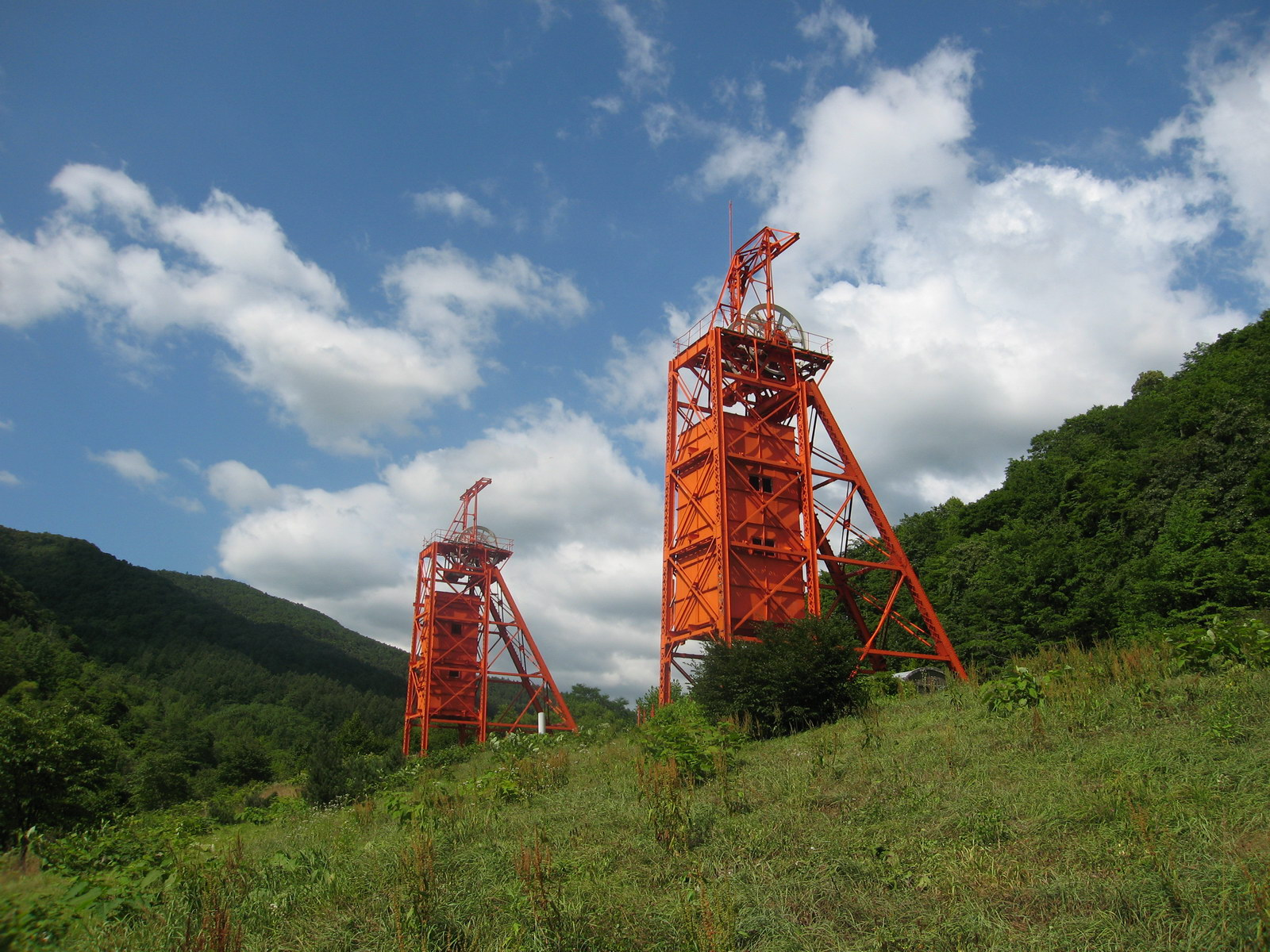 三菱美唄炭鉱立て坑巻き揚げやぐら (炭鉱メモリアル森林公園)